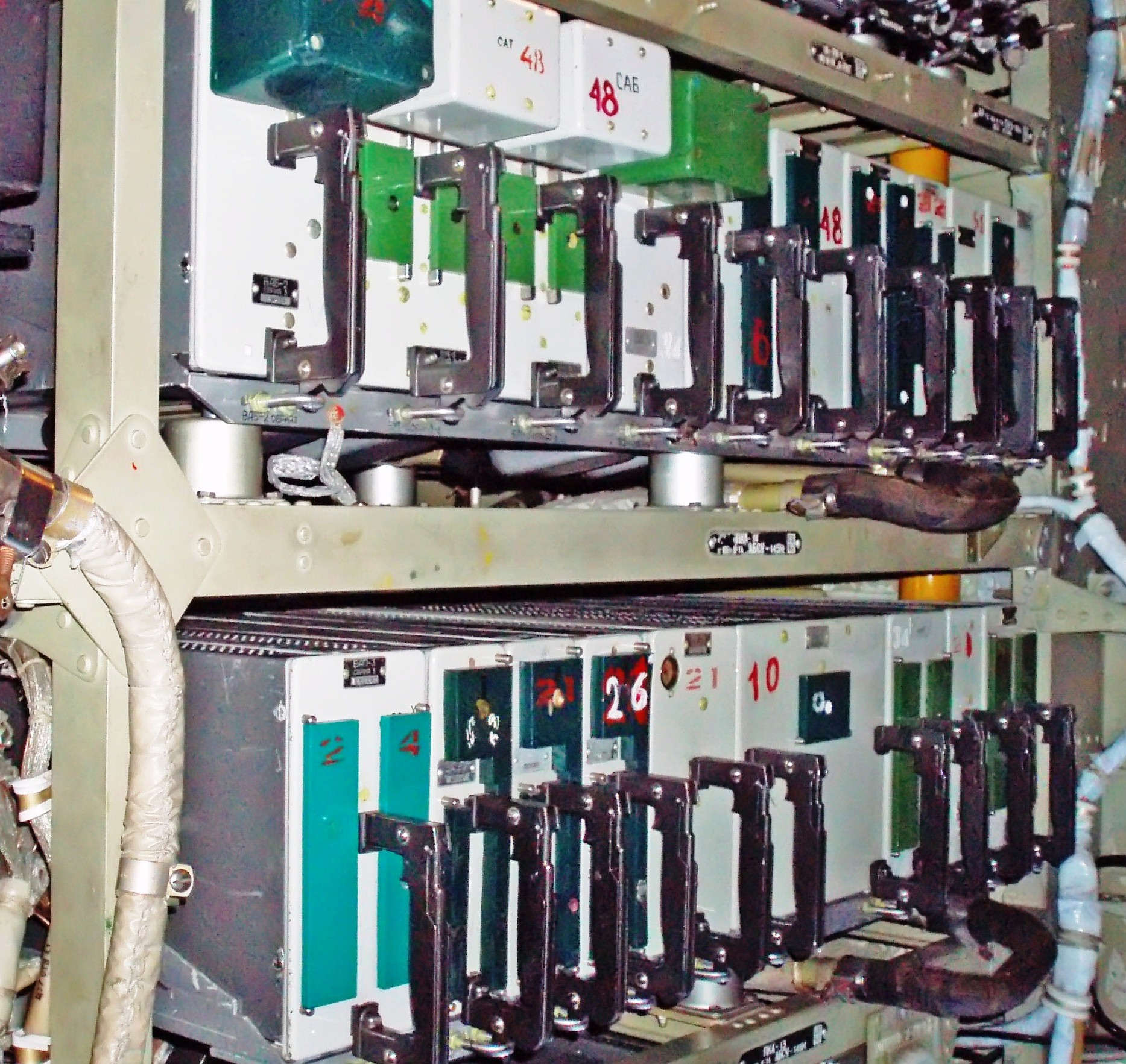 Блоки АБСУ-145М самолёт Ту-22М3